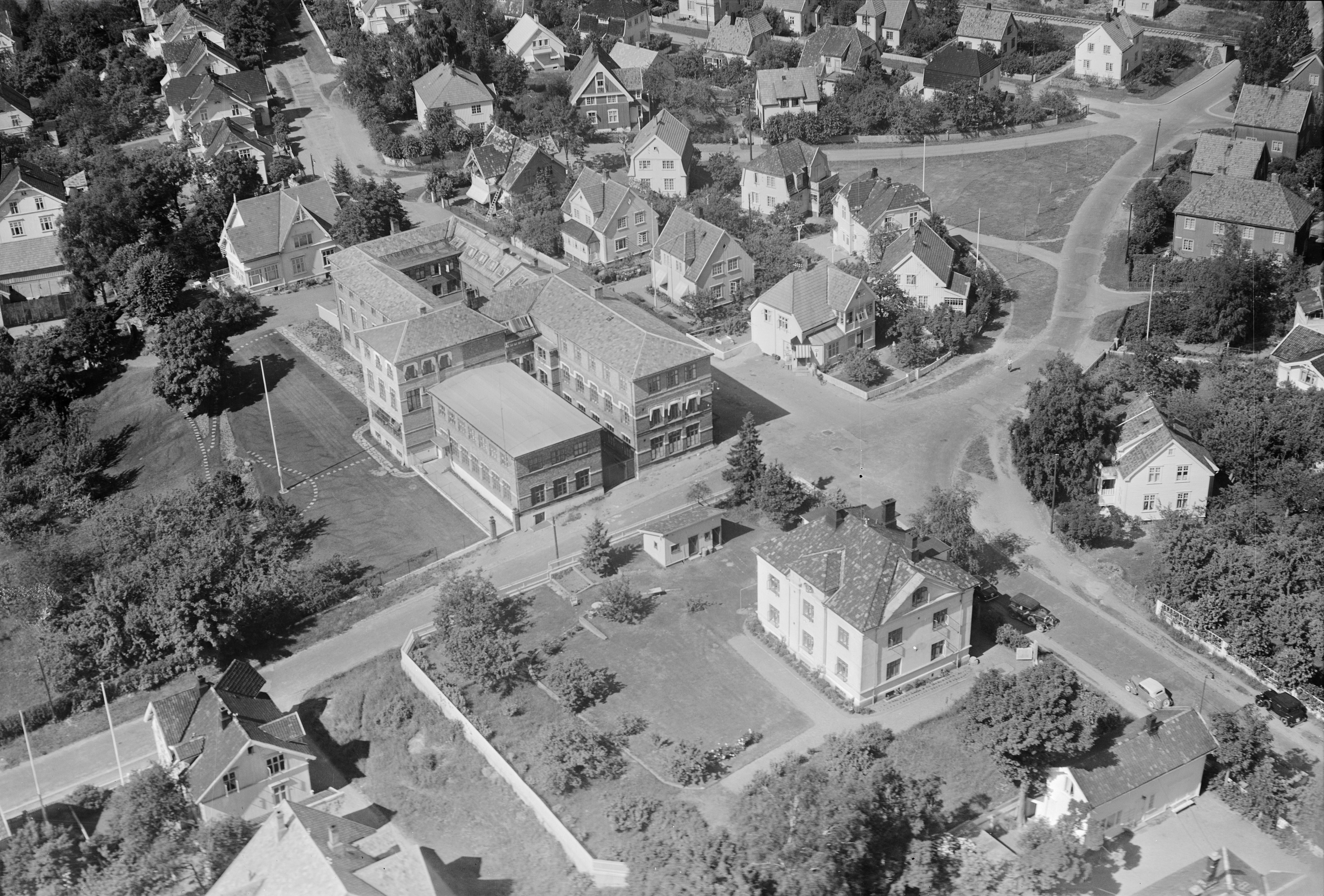 WF.S.A1147